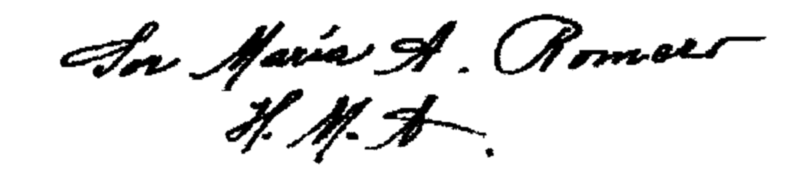 Firma de la beata Sor María Romero Meneses.